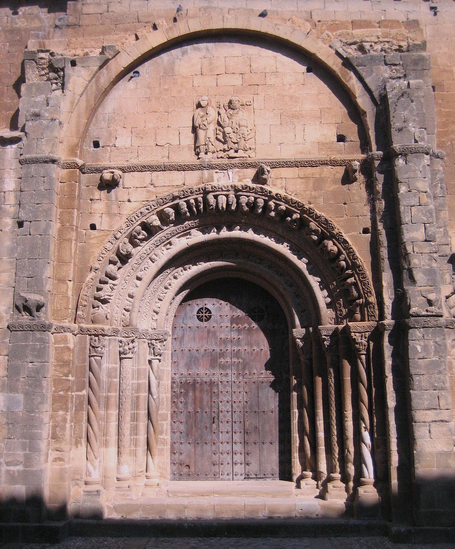 Portada sur de la iglesia de Santa María de Uncastillo (Zaragoza, España)